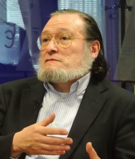 Santiago Niño Becerra